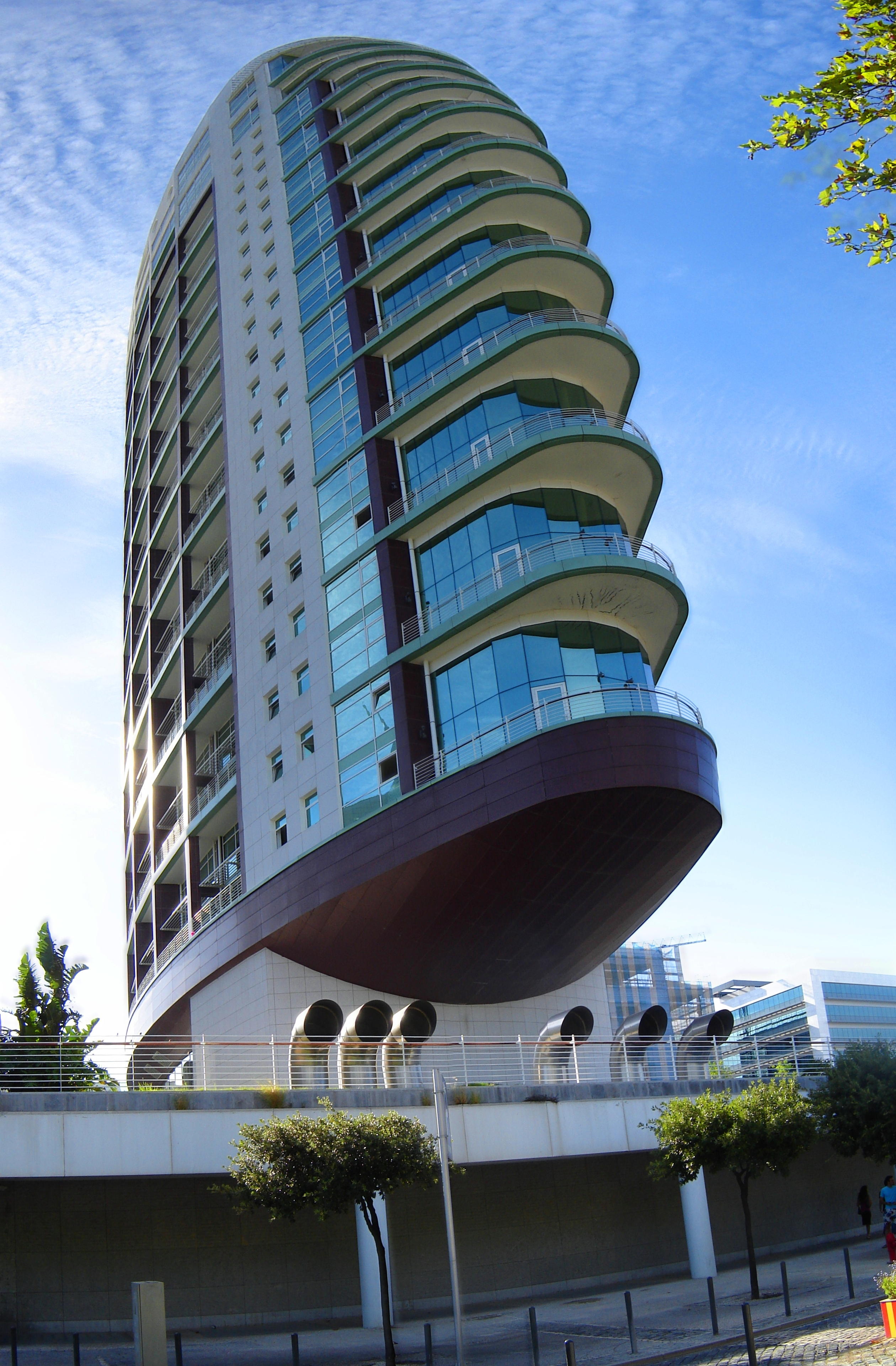 Torre de São Rafael em Lisboa, portugal